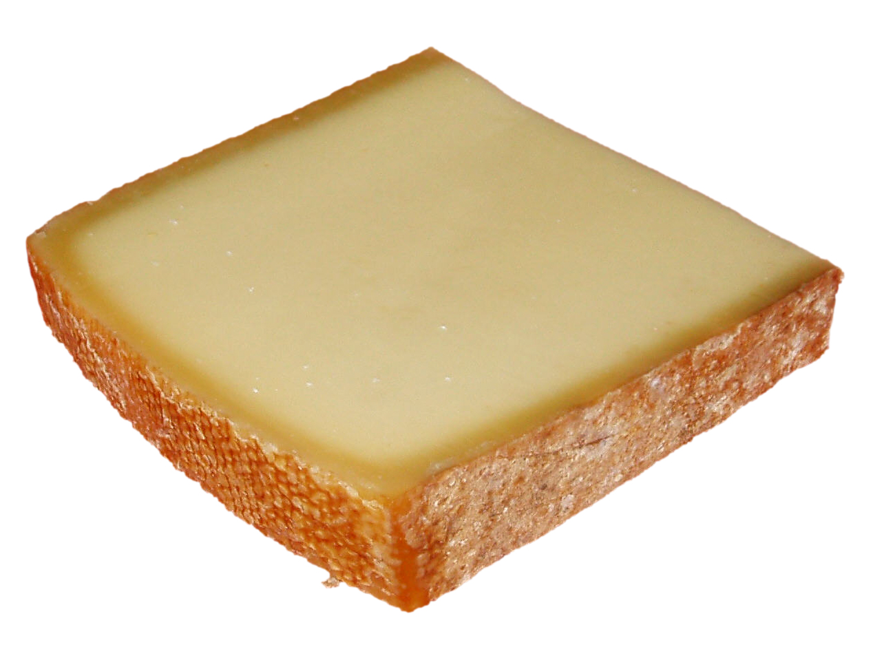 12-monatiger Bergkäse aus dem Allgäu